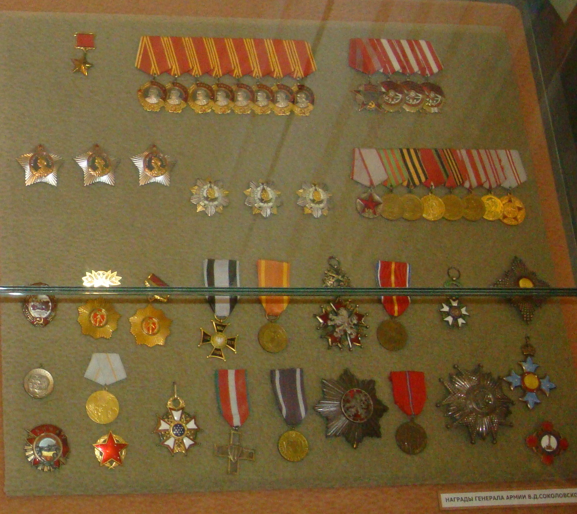 Награды генерала армии Соколовского